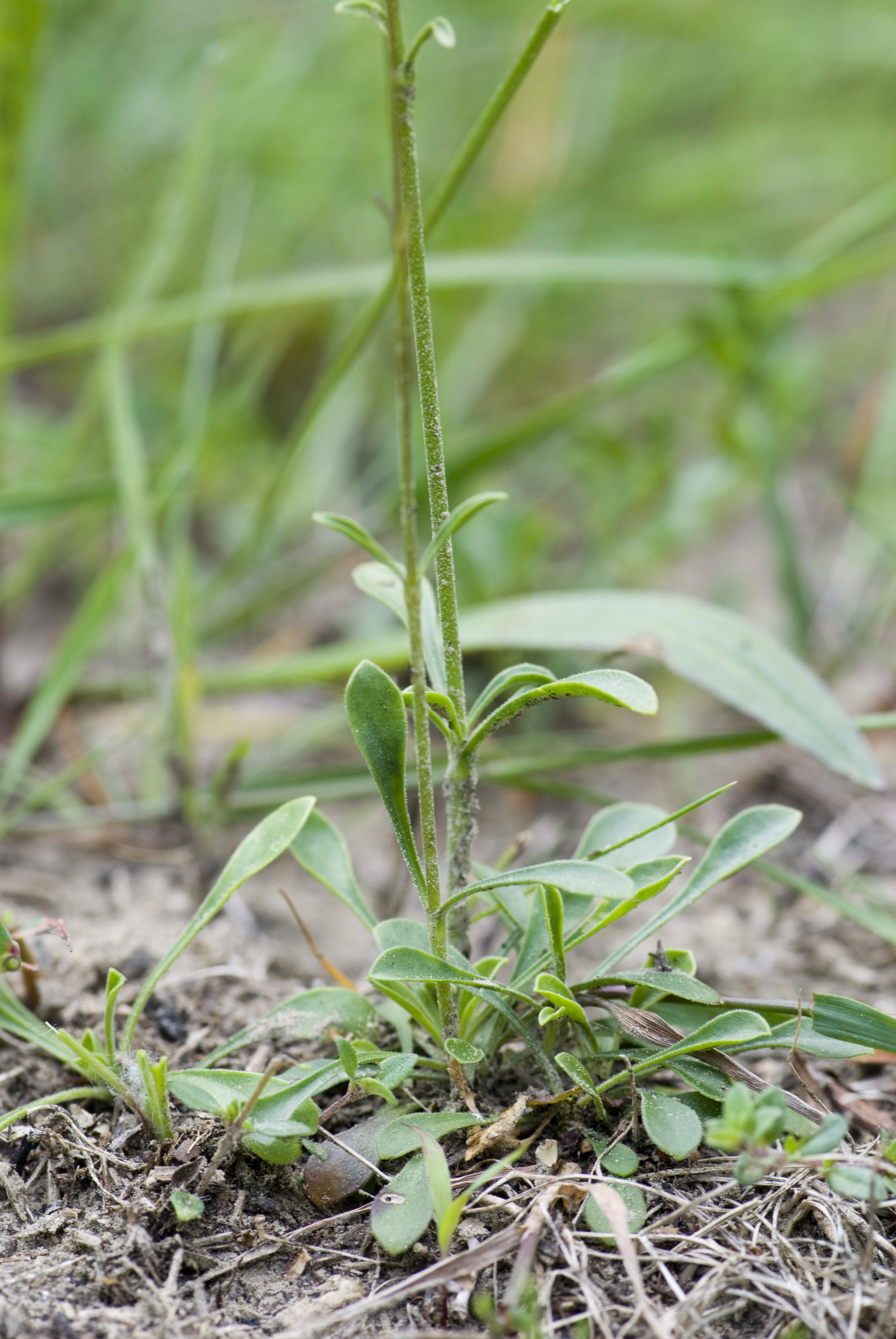 Silene otites Bethisy-Saint-Martin (Oise), France